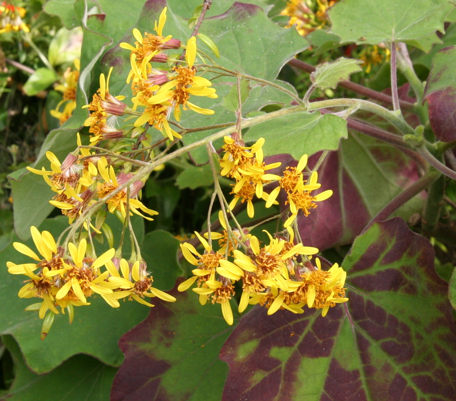 Senecio petasites im Botanischen Garten Dresden